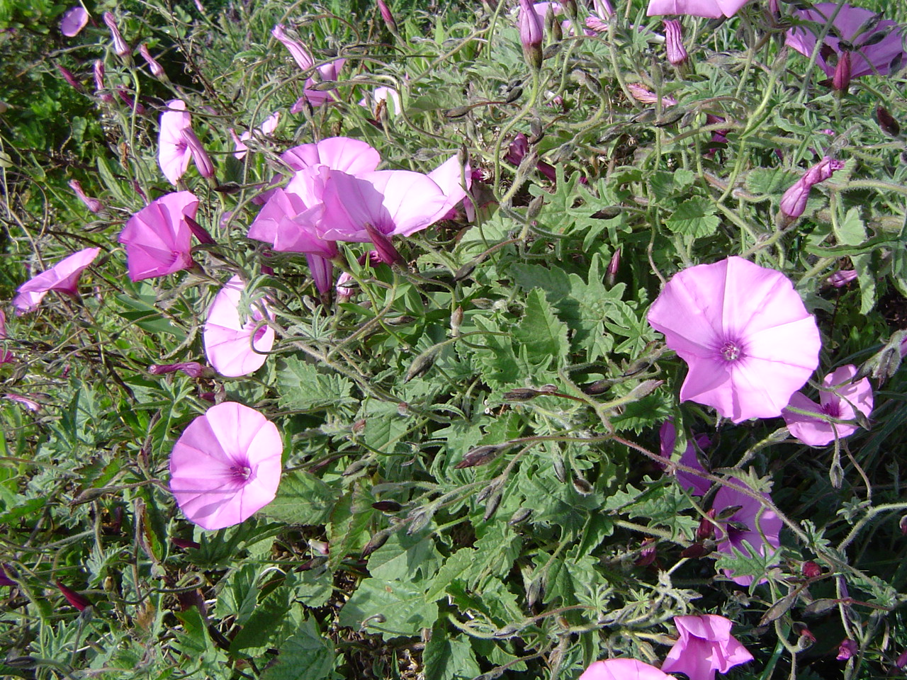 Convolvulus althaeoides, Ceuta, España